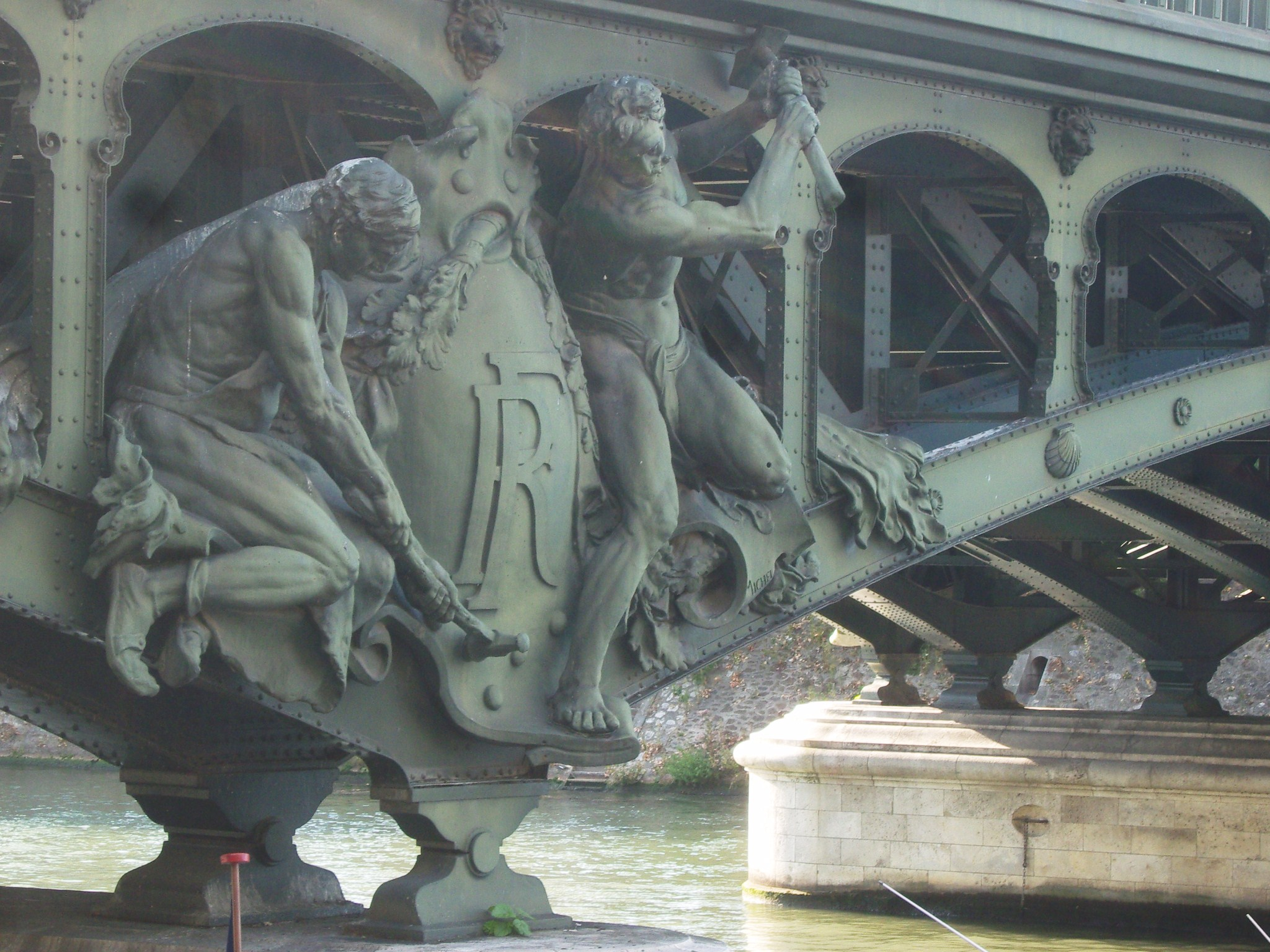 Paris 15e arrondissement - pont de Bir-Hakeim - les forgerons-riveurs, sculpture de Gustave Michel